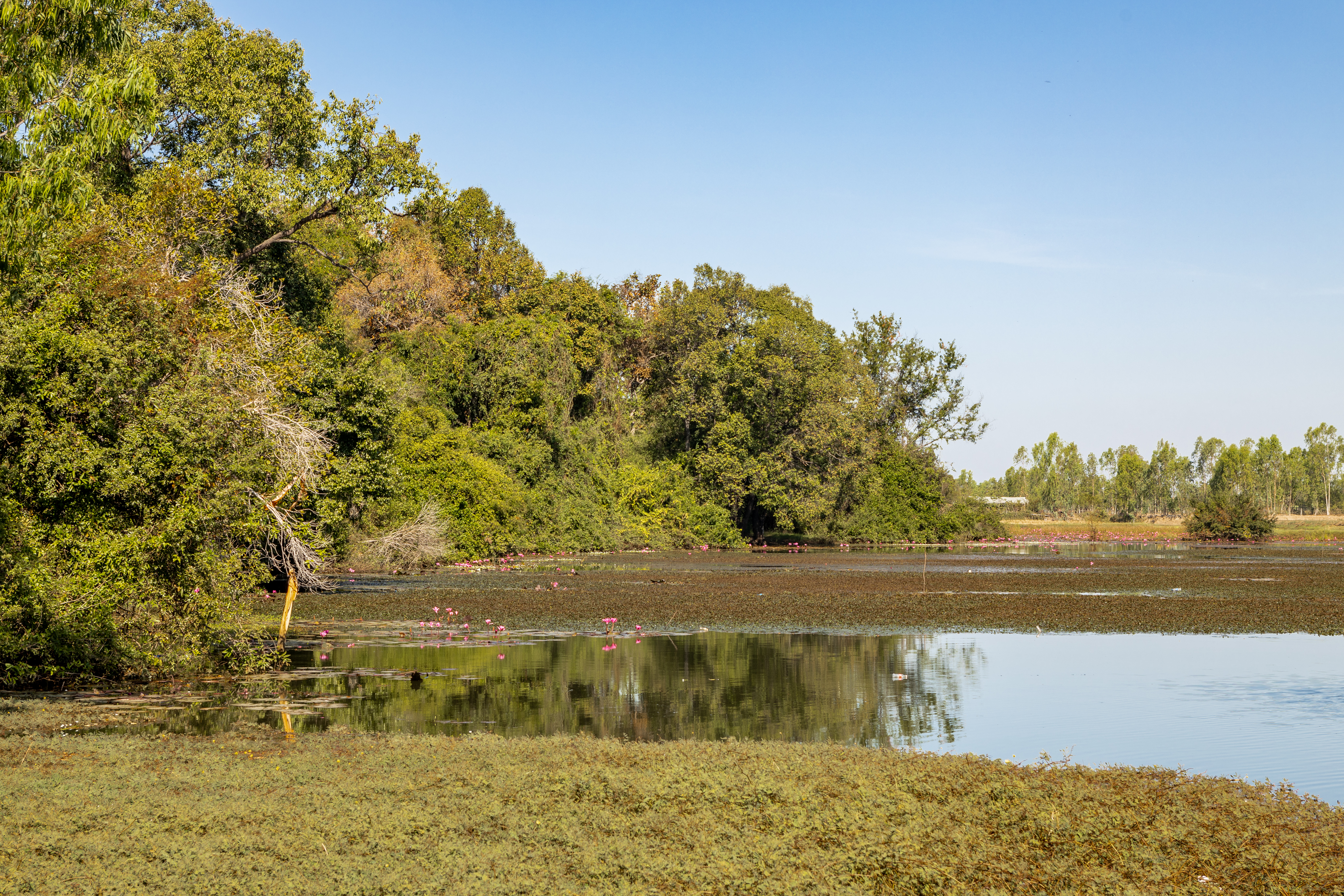 One oxbow lake from Mun River in Ra Sisalai district, Sisaket province, Thailand.